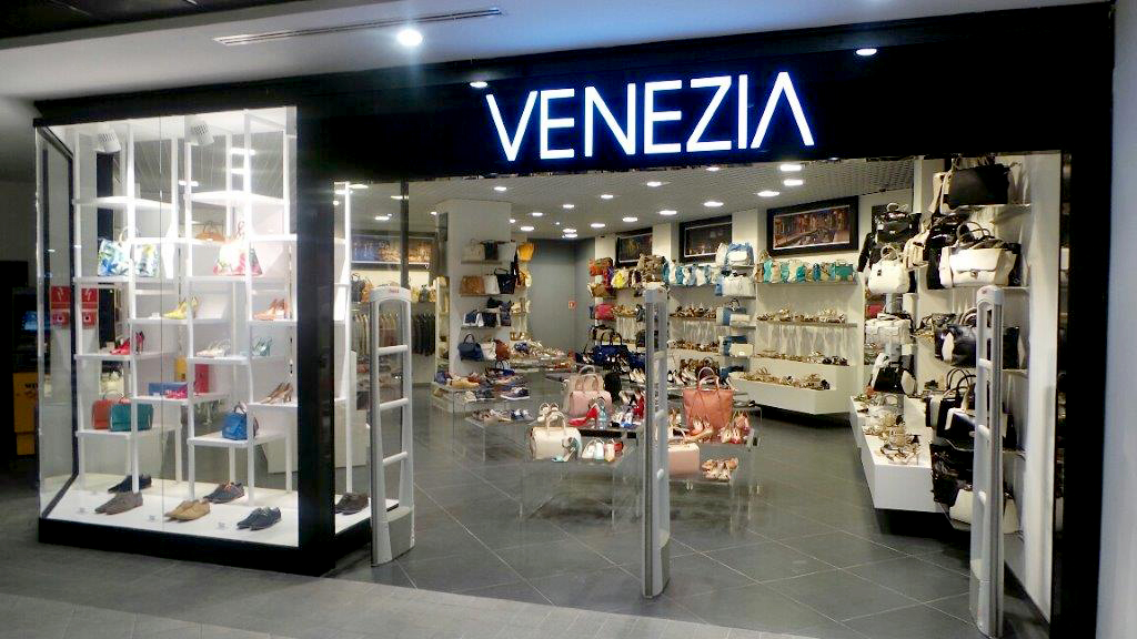 Salon Venezia w Madison Gdańsk